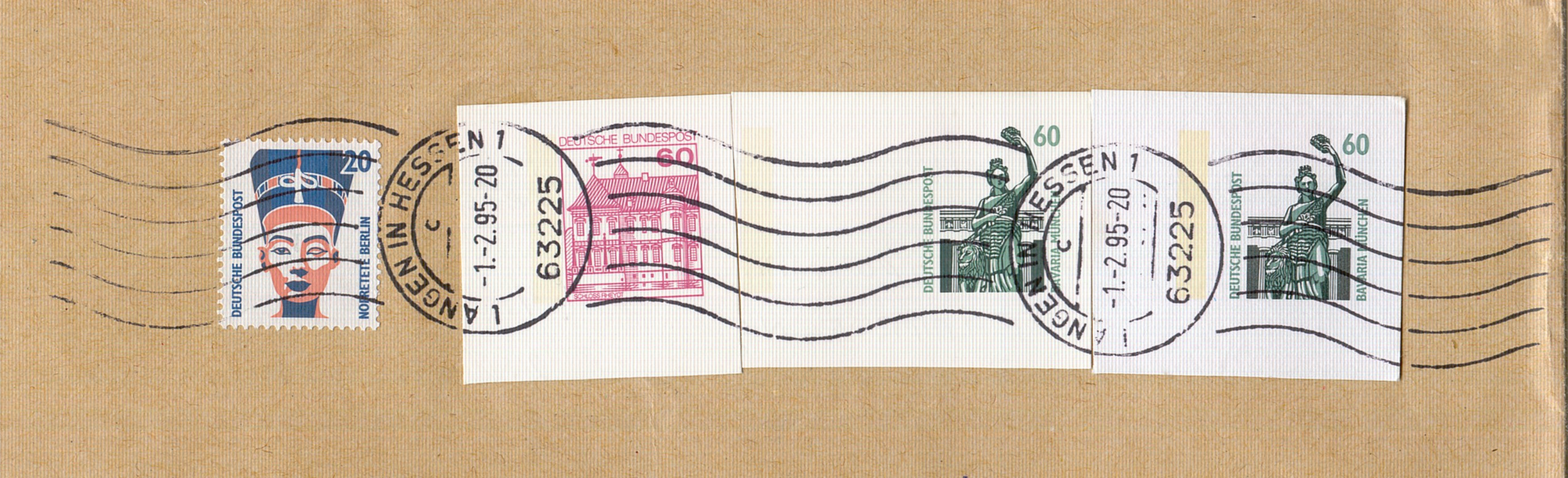 Briefstück mit Mischfrankatur aus Ganzsachenausschnitten und Freimarke (Serie Sehenswürdigkeiten)